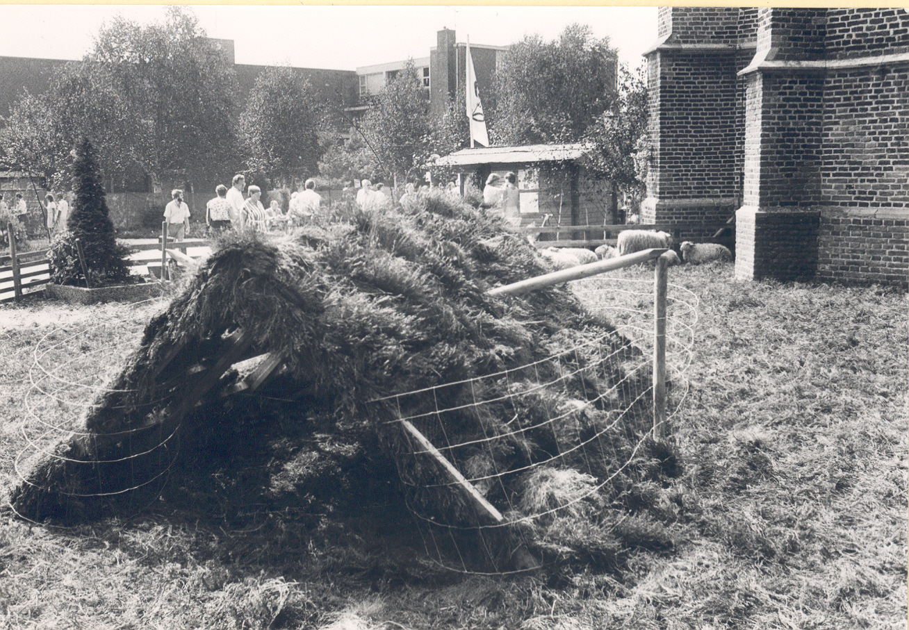 Ter gelegeheid van de Heideweek 1985 leggen leden van de afdeling Ede/Bennekom van de Koninklijke Maatschappij voor Tuin- en Plantkunde op het Kerkplein een heidetuin aan. Een kleine plaggenhut voor de schapen mag daarin niet ontbreken.